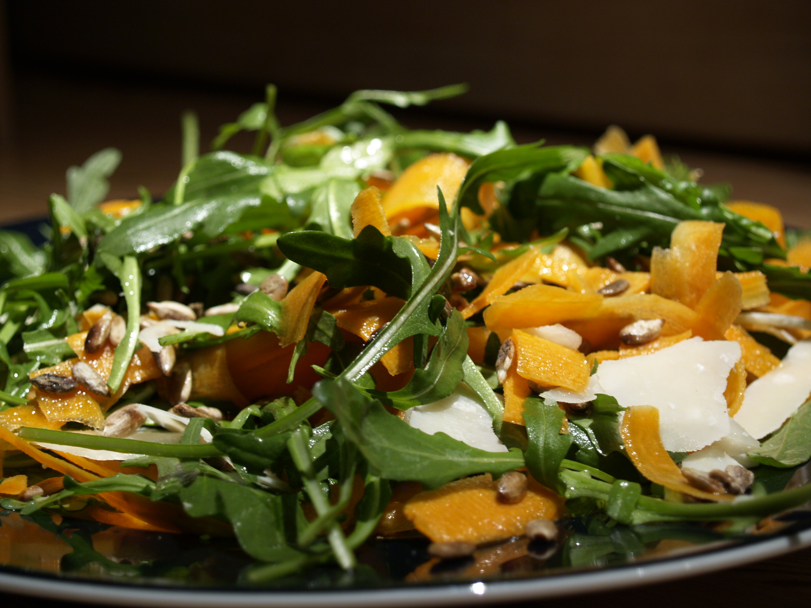 Salat af rucola, gulerødder, parmesan og solsikkekerner